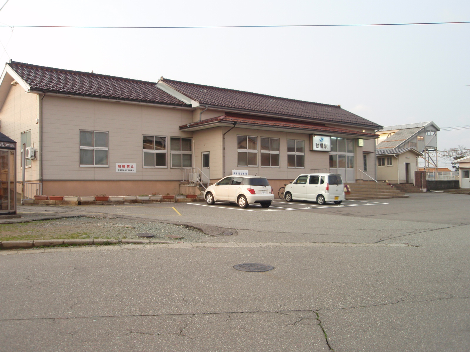 動橋駅 正面外観